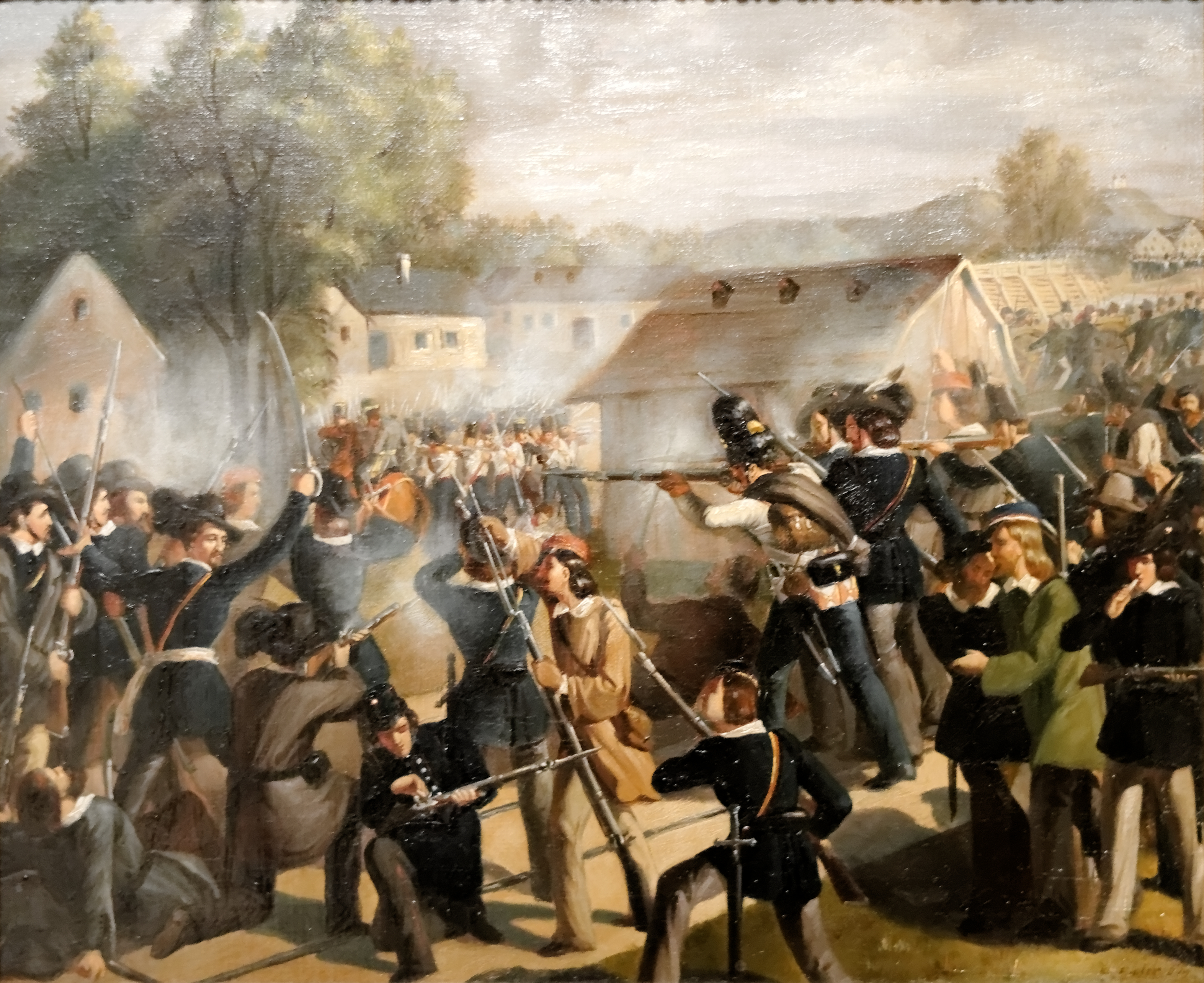 Der Kampf an der Taborbrücke in der Leopoldstadt am 6.Oktober 1848 1849 – Bonaventura Emler (1831-1862) Gefecht der Nationalgarde und Akademischer Legion auf der einen Seite und dem Regiment Nassau auf der anderen, das den Abmarsch des Grenadierbataillons Richter zur Bekämpfung der ungarischen Revolution mit Gewalt erzwingen wollte. Das Militär wurde zurückgeschlagen und die Wiener zogen, begleitet von fratenisierenden Truppen des Bataillons Richter, mit drei erbeuteten Kanonen trimphierend in Wien ein. Bonvaentura Emler nahm als akademischer Legionär an diesem Gefecht teil.